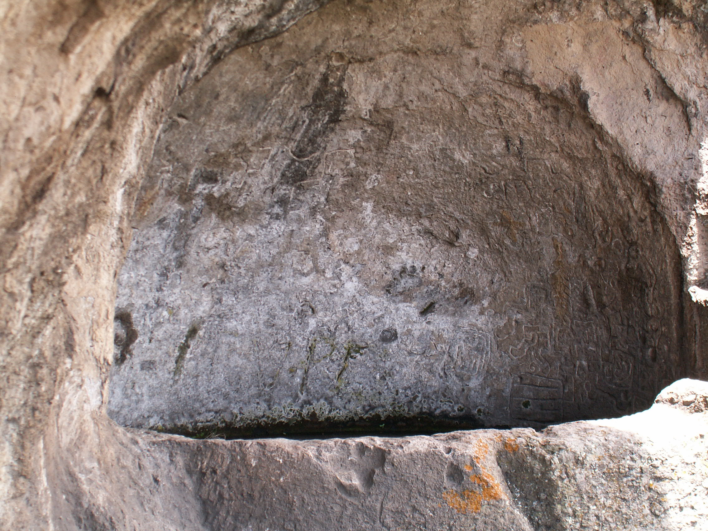 Pétroglyphe de Cumbe Mayo / Cajamarca / Perou